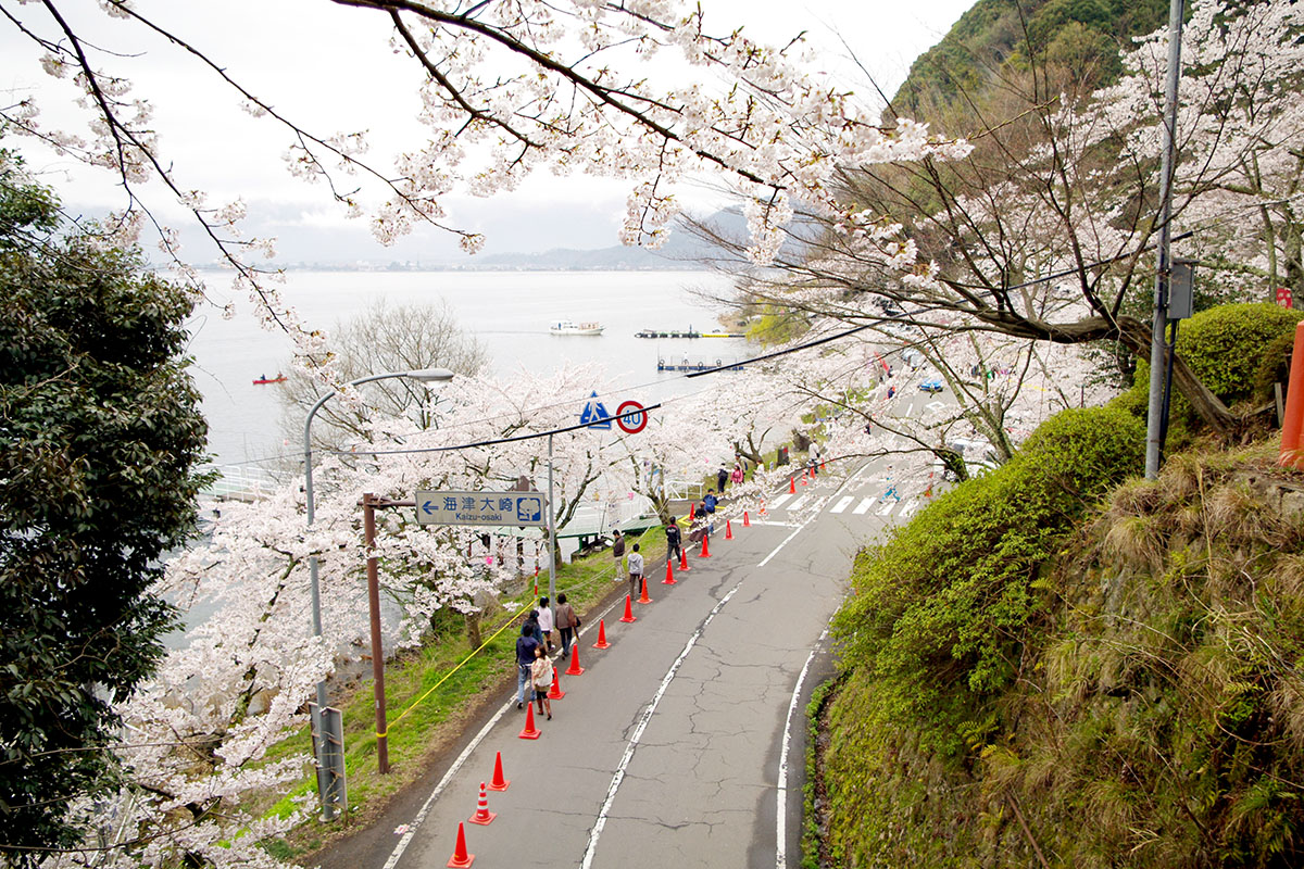 Sakura at Kaizu-Osaki, Biwako Lake (Takashima, Shiga, Japan)